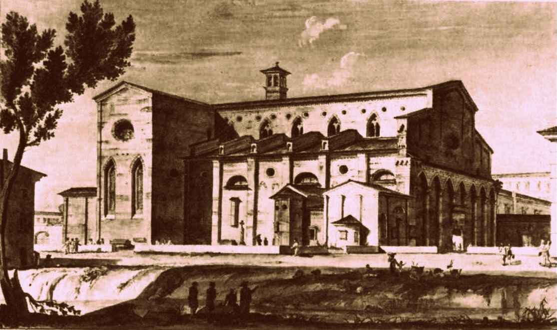 Chiesa di Sant'Agostino a Padova. Incisione di Marino Urbani.